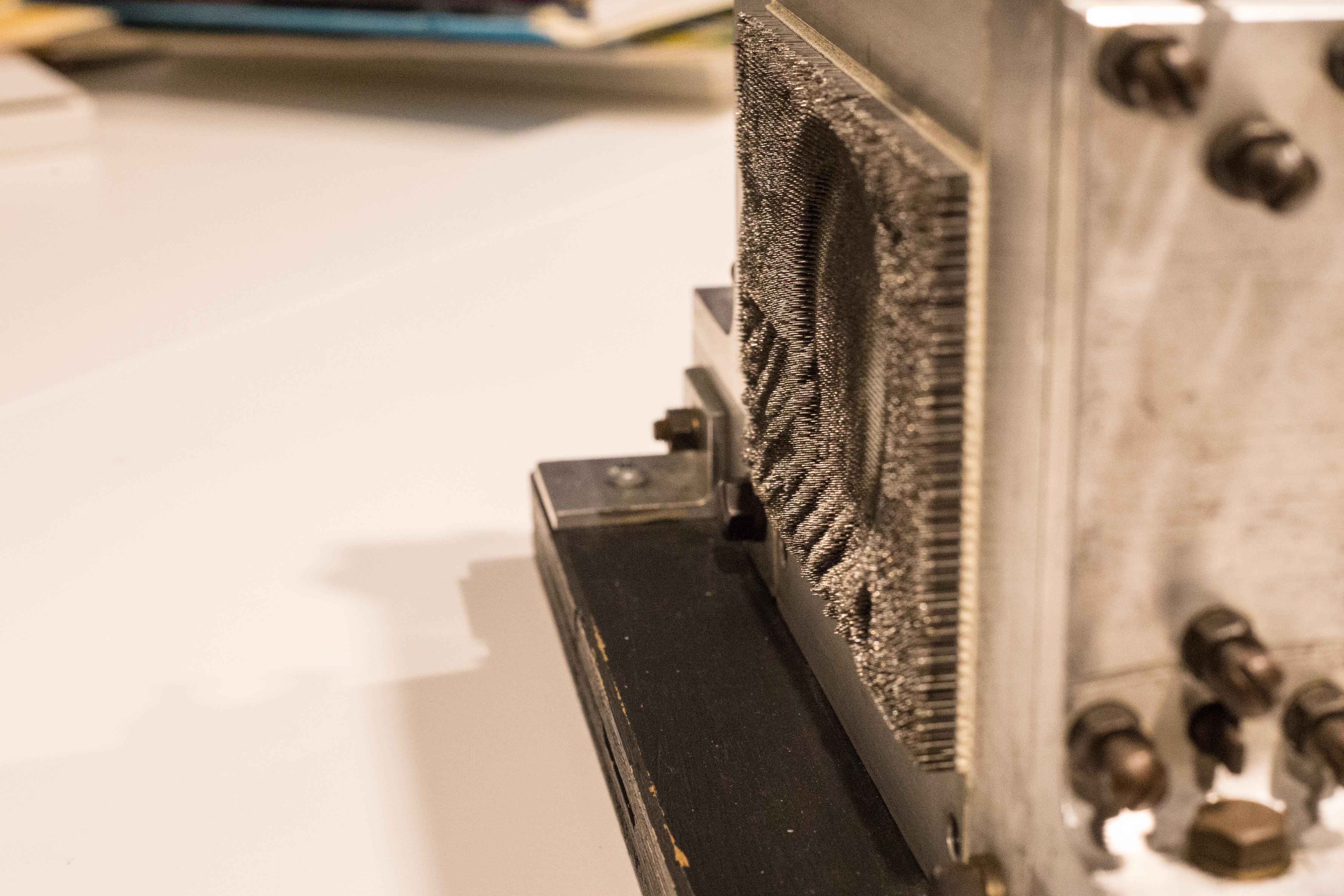 Détail d'un écran d'épingles Baby Screen. Photo prise à la Médiathèque Guy-L.-Coté de la Cinémathèque québécoise.